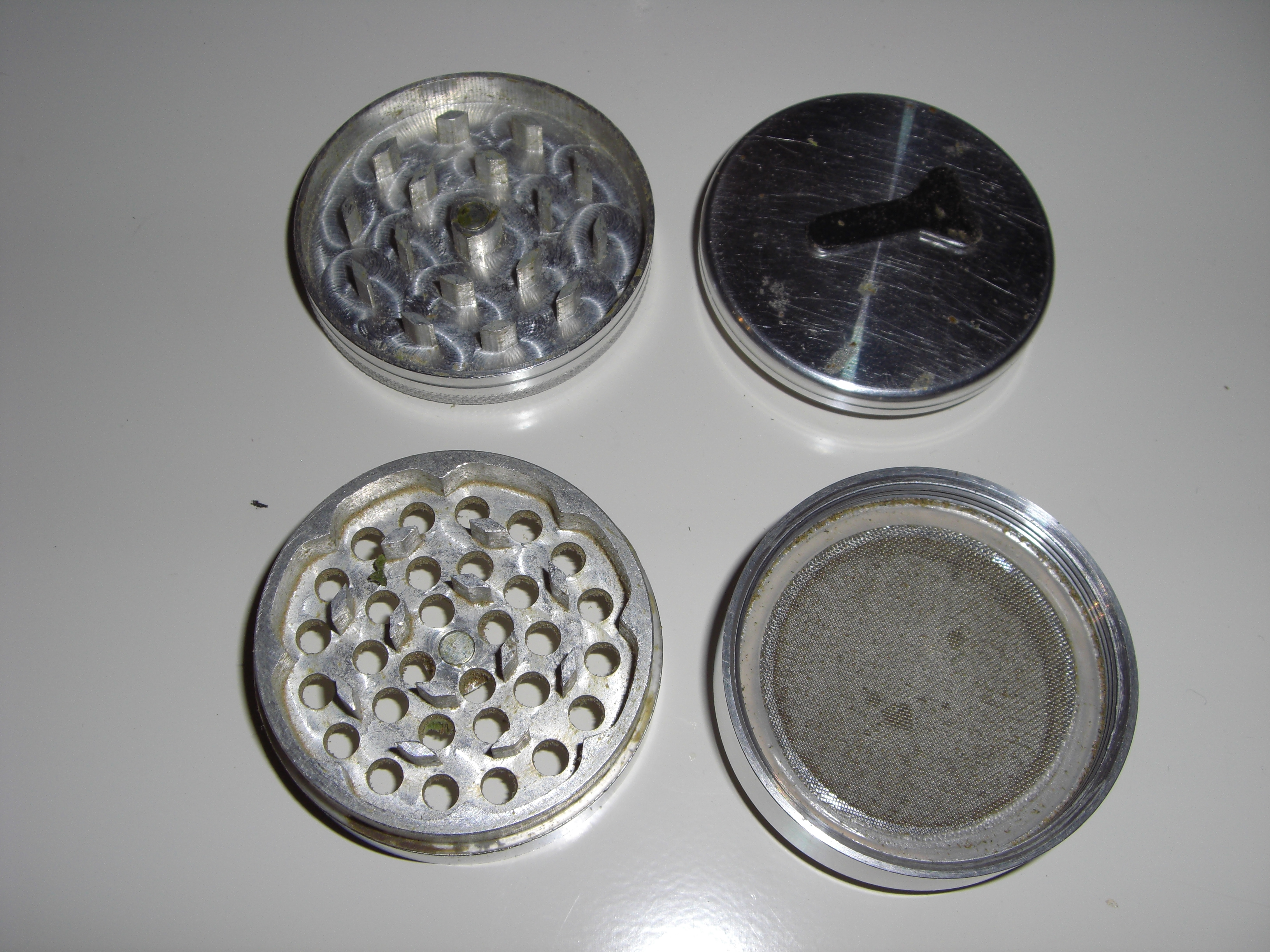 Vier Teiliger Grinder mit Pollinator